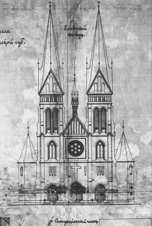 Беларуская (тарашкевіца): Вялікія Эйсманты (Vialikija Ejsmanty). Касьцёл, нерэалізаваны праект